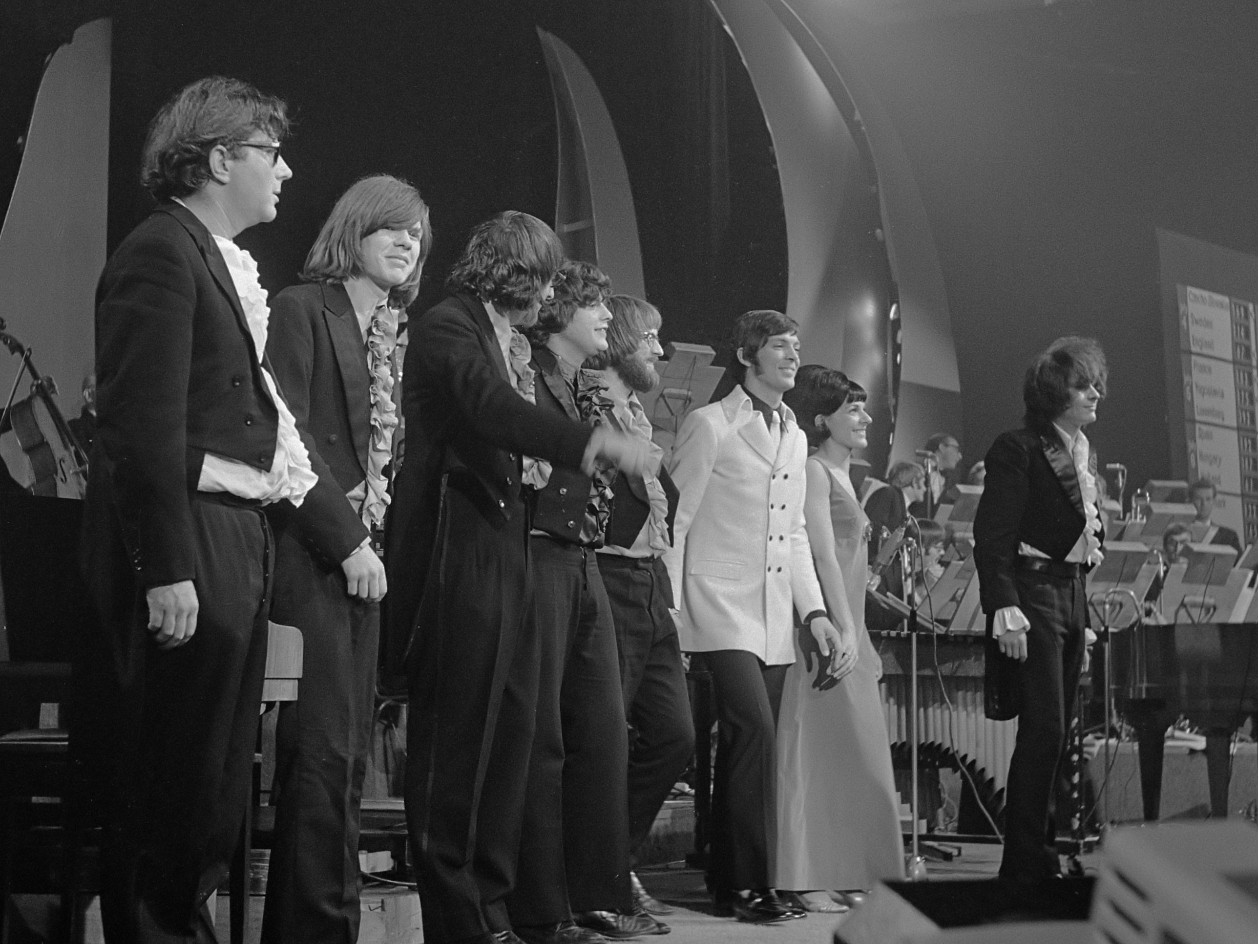 Singing Europe 1969, finale in Scheveningen. De Belgische ploeg: Wallace Collection, Joe Harris en Rita Deneve 9 juli 1969